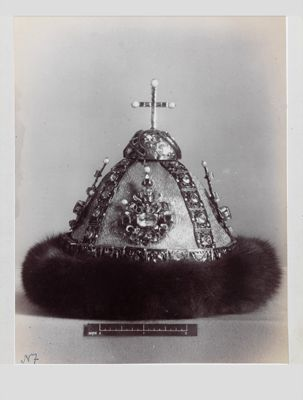 Фотография "Шапка Алтабасная царя Ивана Алексеевича" 1885-1887 гг. Фототипия художника М.М. Панова Архив Музеев Московского Кремля Фонд фотодокументов Ф.60, д.33, л. 37.